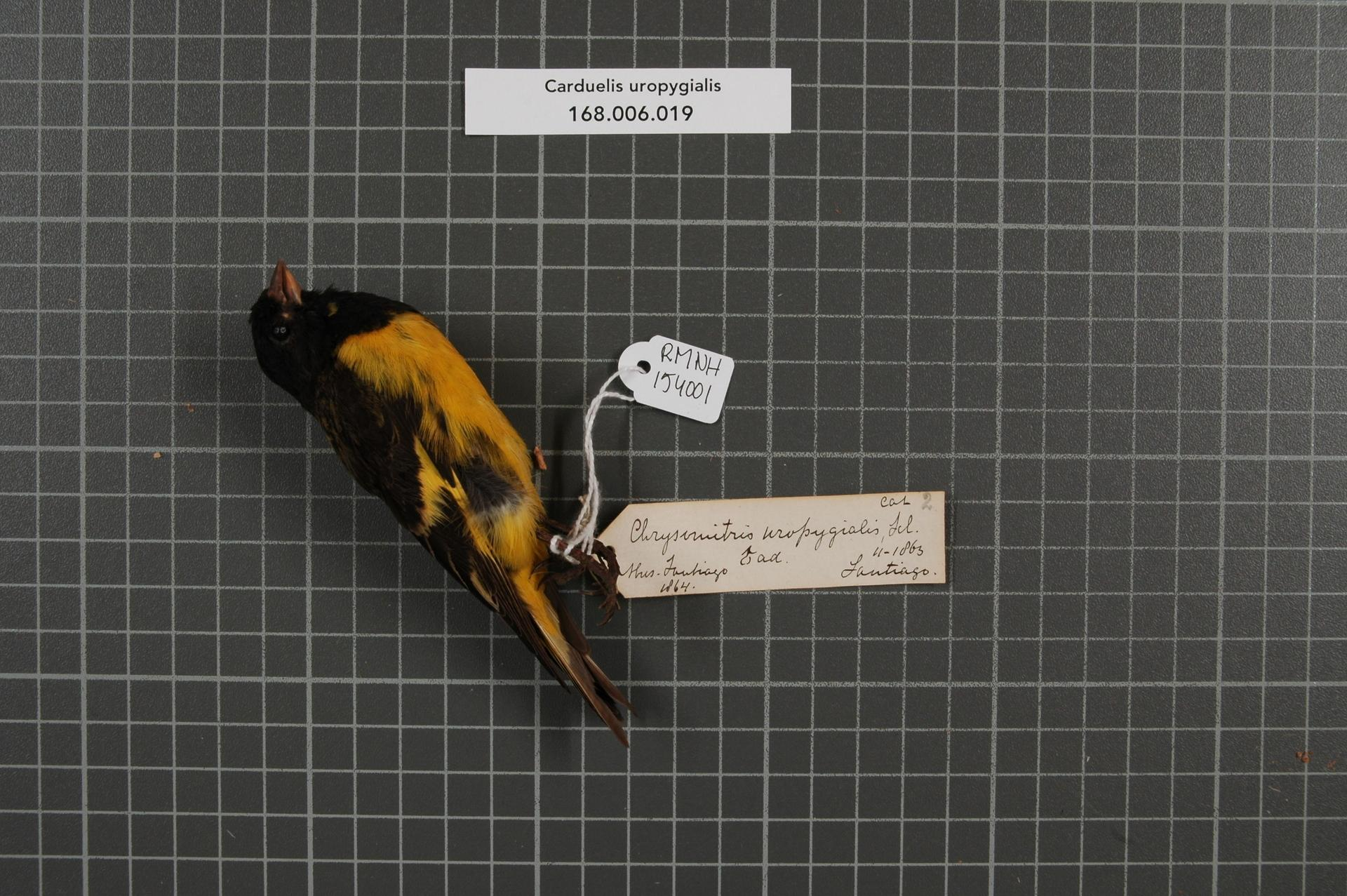 Carduelis uropygialis (P.L. Sclater, 1862)